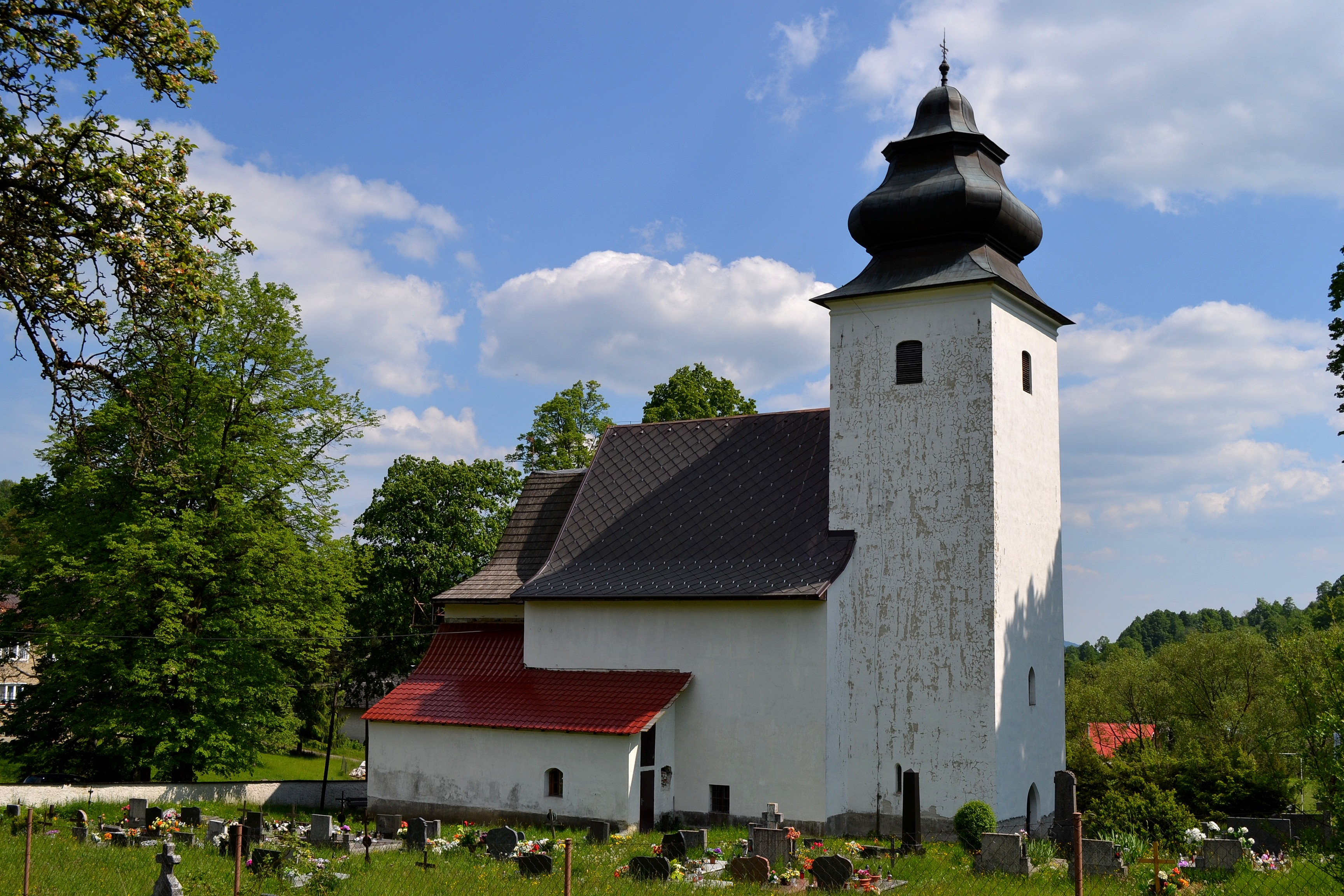 Lúčky (okr. Žiar nad Hronom), Kostol svätého Mikuláša; celkový pohľad